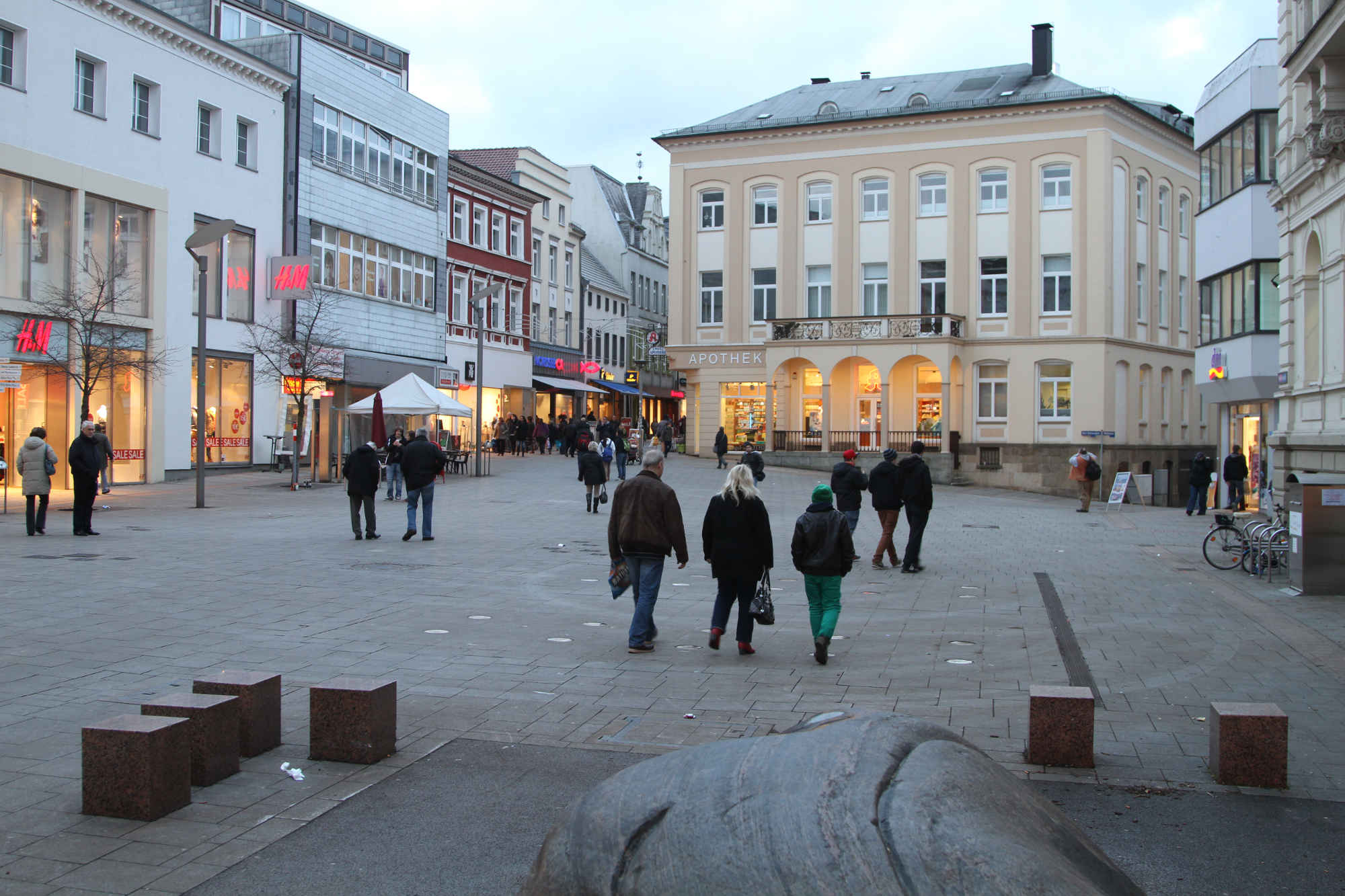 Alter Markt mit Blick auf die Engel-Apotheke, Iserlohn